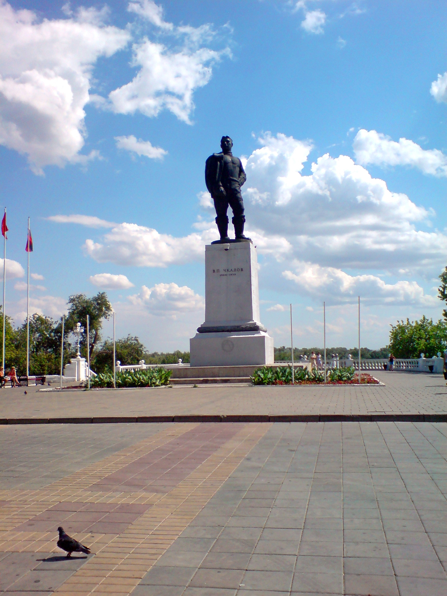 Памятник В.П. Чкалову: набережная реки Урал, им.Свердлова бульв., Оренбург, Оренбургская область